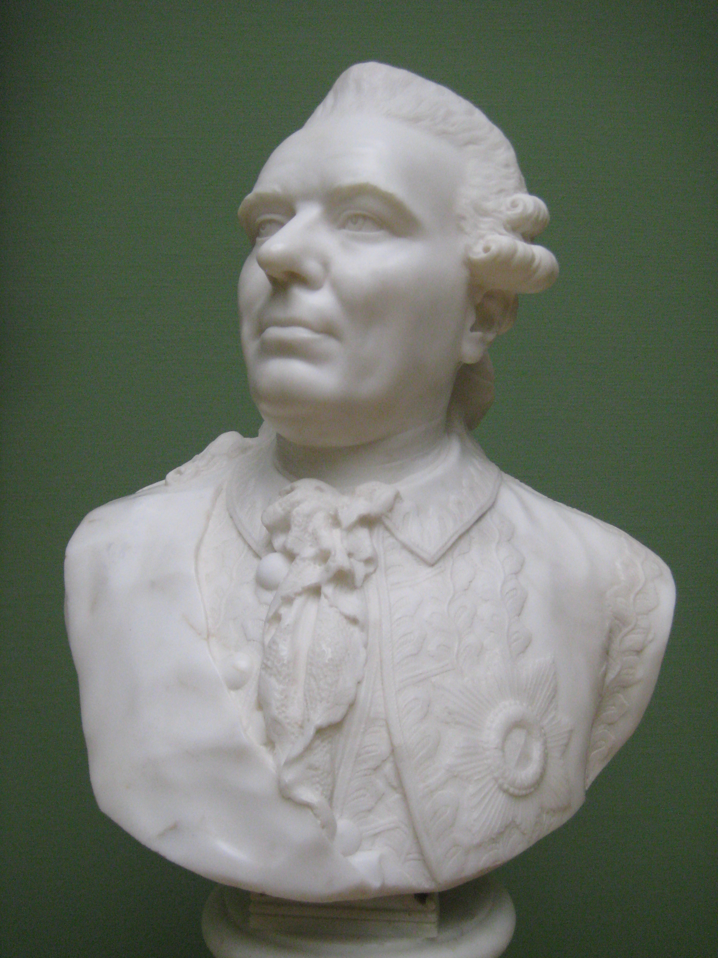 Захар Чернышев. Бюст работы Ф. Шубина. 1774. ГТГ.